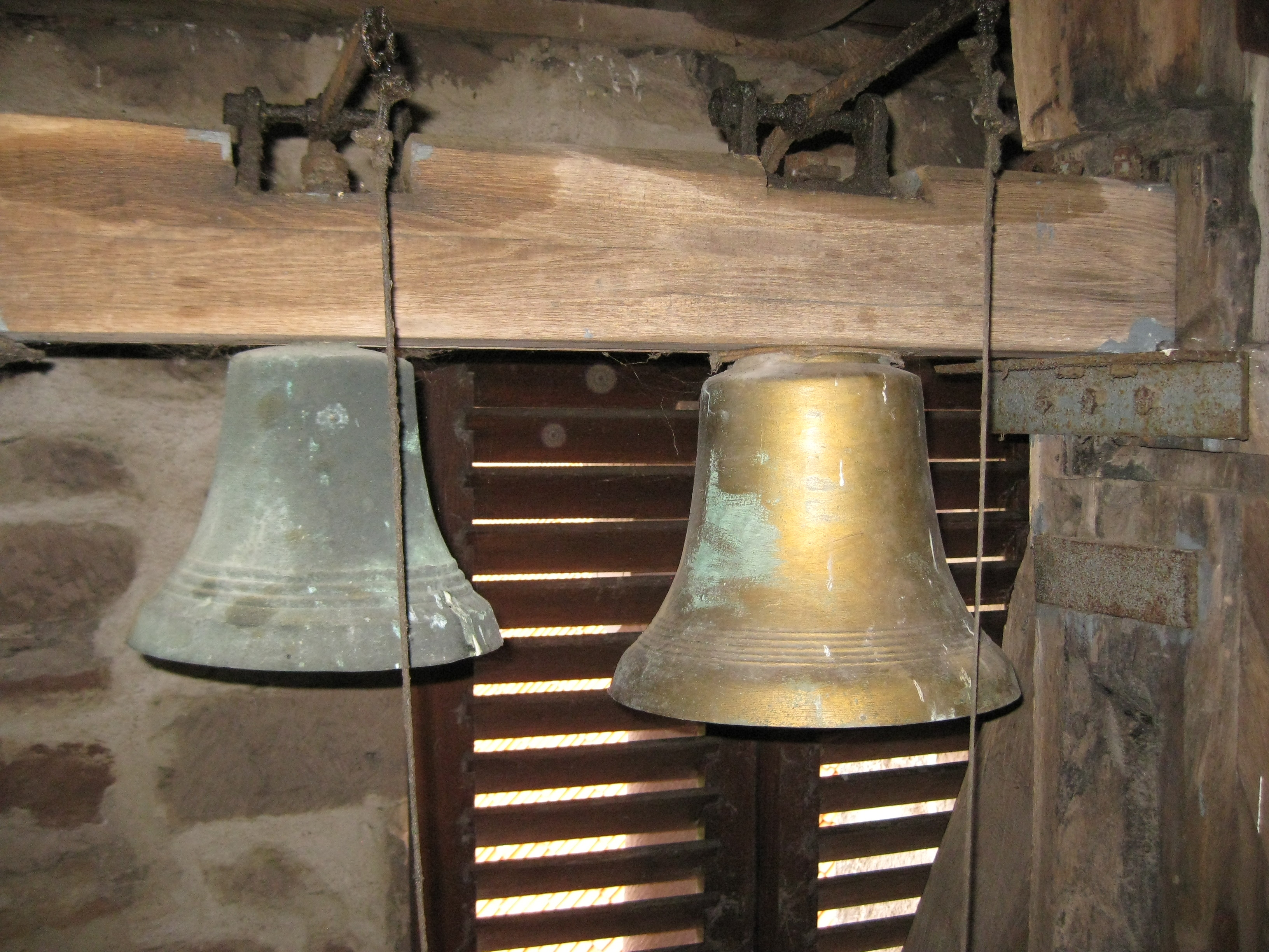 Nordturm der Klosterkirche St. Christophorus in Reinhausen, Südniedersachsen. Die beiden Schlagglocken der Uhr waren beim Tag des offenen Denkmals 2015 zu besichtigen.